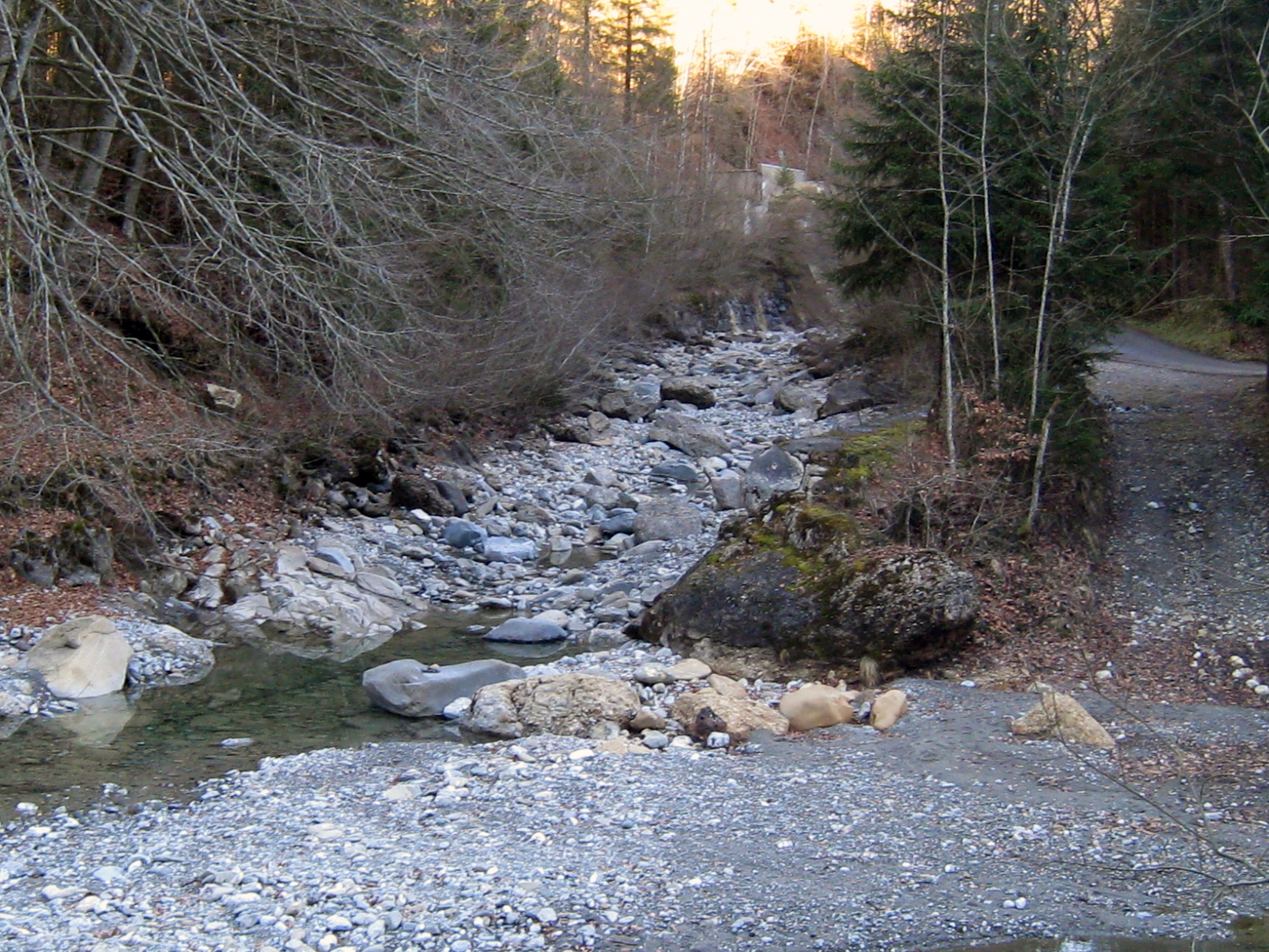 Trepsental Bachbett bei der Mündung in die Wägitaler Aa